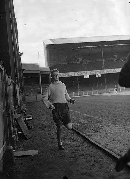 Teitl Cymraeg/Welsh title: Clwb Pêl droed Abertawe. Ffotograffydd/Photographer: Geoff Charles (1909-2002) Dyddiad/Date: 10/1951 Cyfrwng/Medium: Negydd ffilm / Film negative Cyfeiriad/Reference: (gch02316) Rhif cofnod / Record no.: 3368292 Rhagor o wybodaeth am gasgliad Geoff Charles yn Llyfrgell Genedlaethol Cymru More information about the Geoff Charles Collection at the National Library of Wales Mae ffotograffau Geoff Charles hefyd yn rhan o Broject Europeana Libraries Geoff Charles' photographs also form part of the Europeana Libraries Project